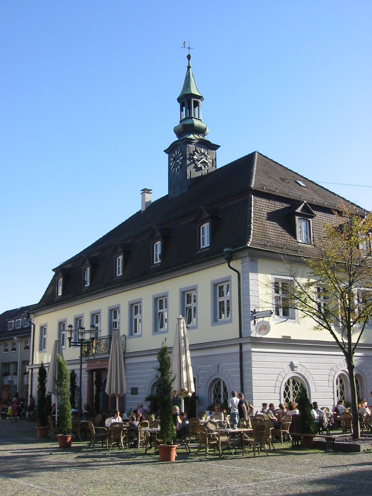 Altes Rathaus von Emmendingen mit Deutschem Tagebucharchiv